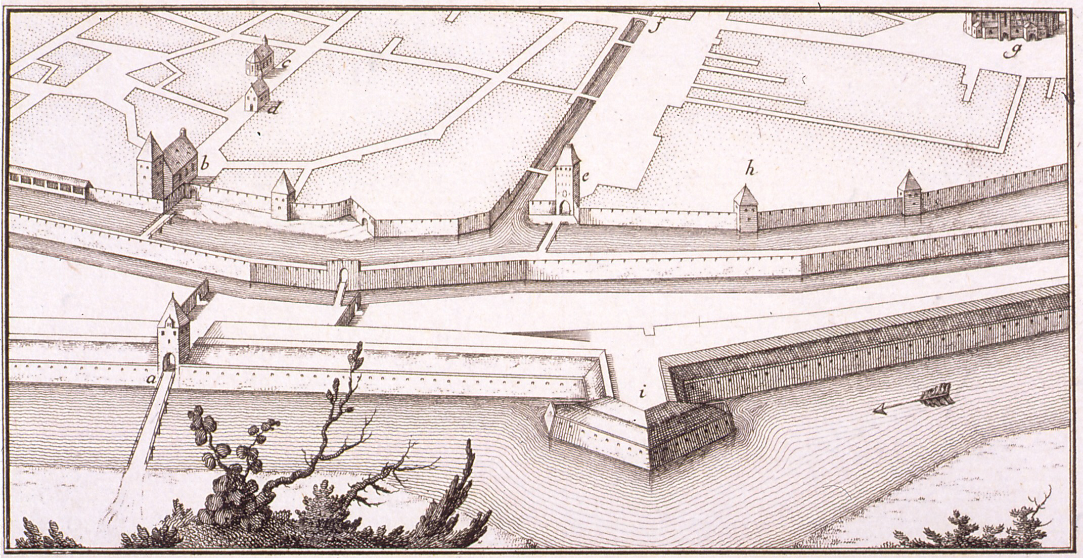 Gravure représentant la porte des juifs à Strasbourg.